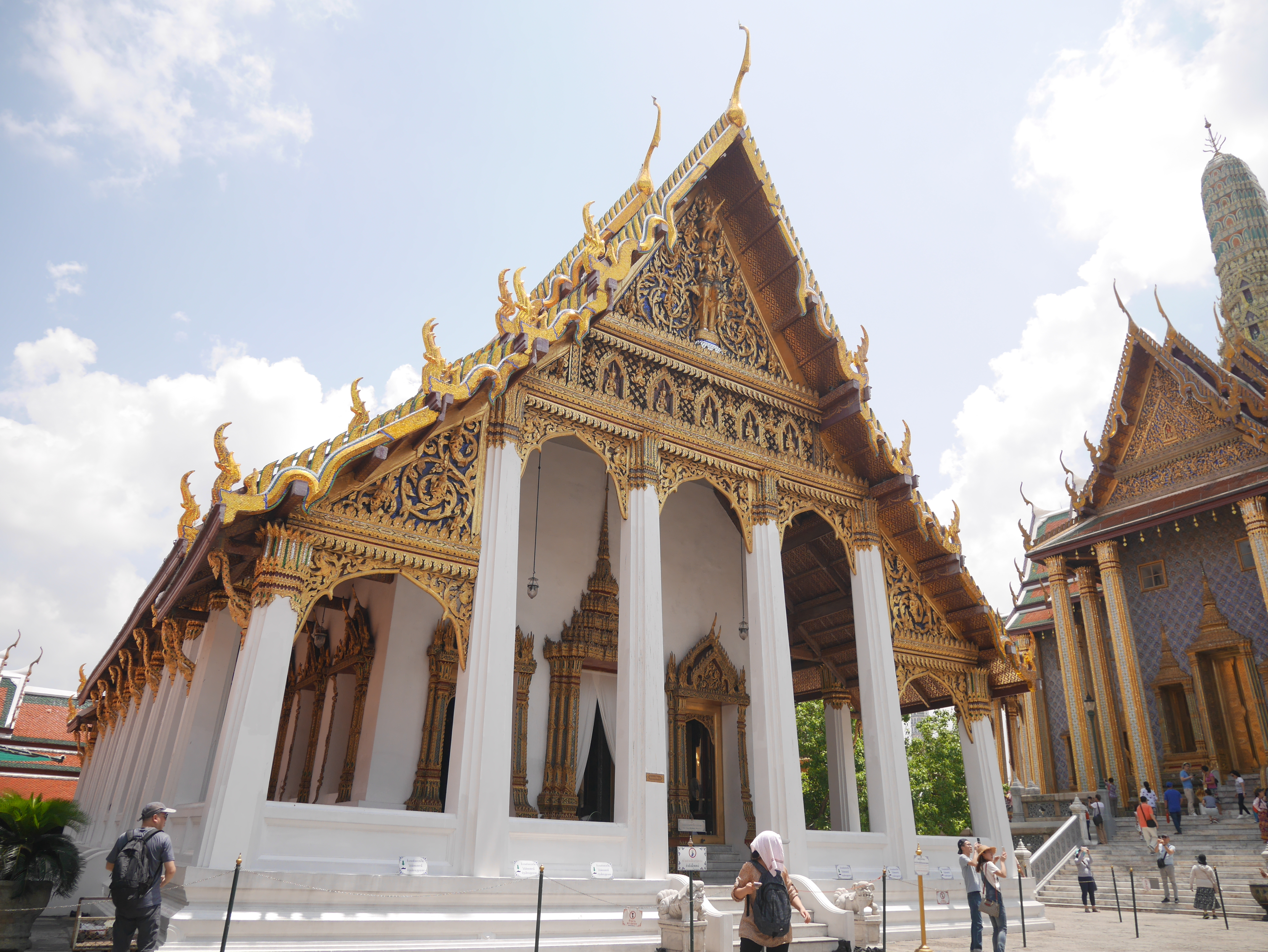 พระบรมมหาราชวังและวัดพระศรีรัตนศาสดาราม เจ้าของบัญชี กสิณธร ราชโอรส เป็นเจ้าของบัญชีเดียวกับ บัญชี Phonlakrit Sunthornphon ของ Facebook บัญชี Tsutomu RIkimi ของ Google และ Panoramio .com บัญชี ซูบารุโยของ กสิณธร ราชโอรส same account holder of Facebook (Phonlakrit Sunthornphon),Google and (Tsutomu RIkimi) and ซูบารุโย at